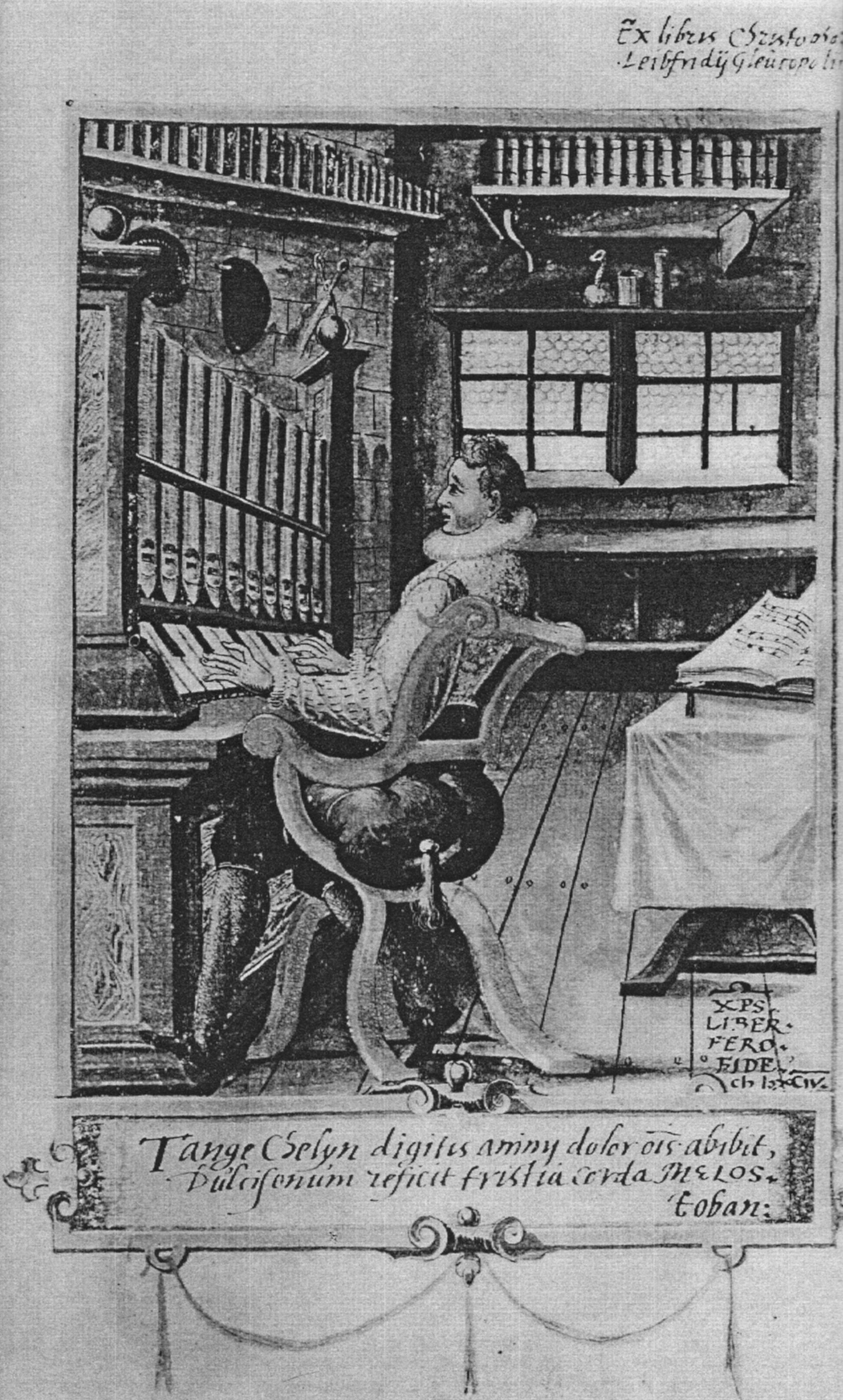 Porträtexlibris des Dr. Christoph Leibfried